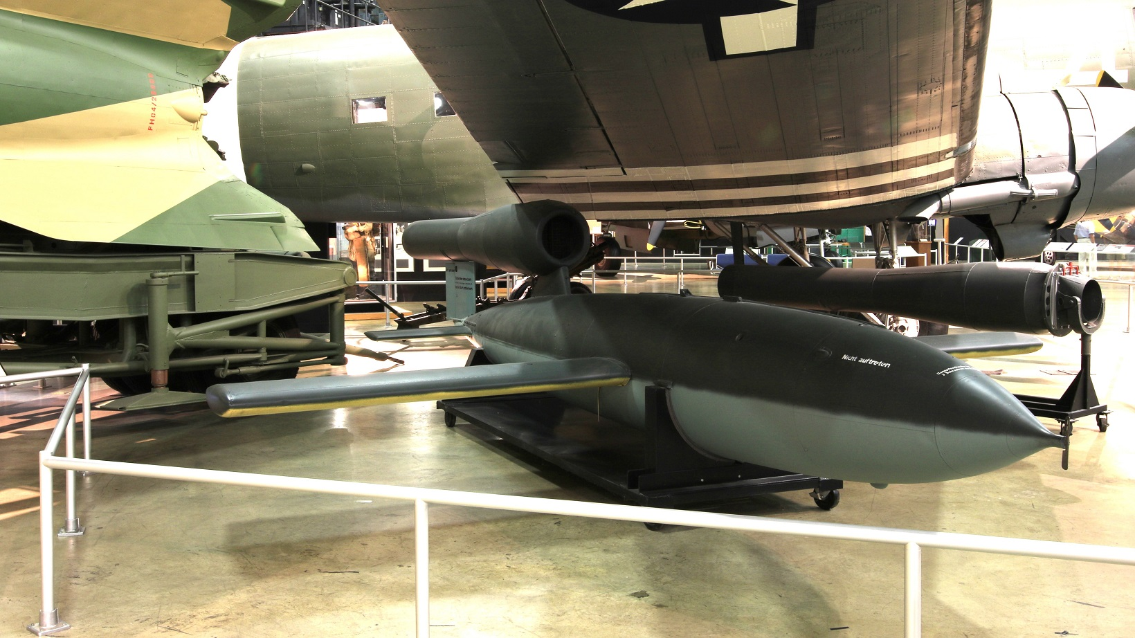 V-1 / / National Museum of the U.S. Air Force / 2015年7月26日撮影